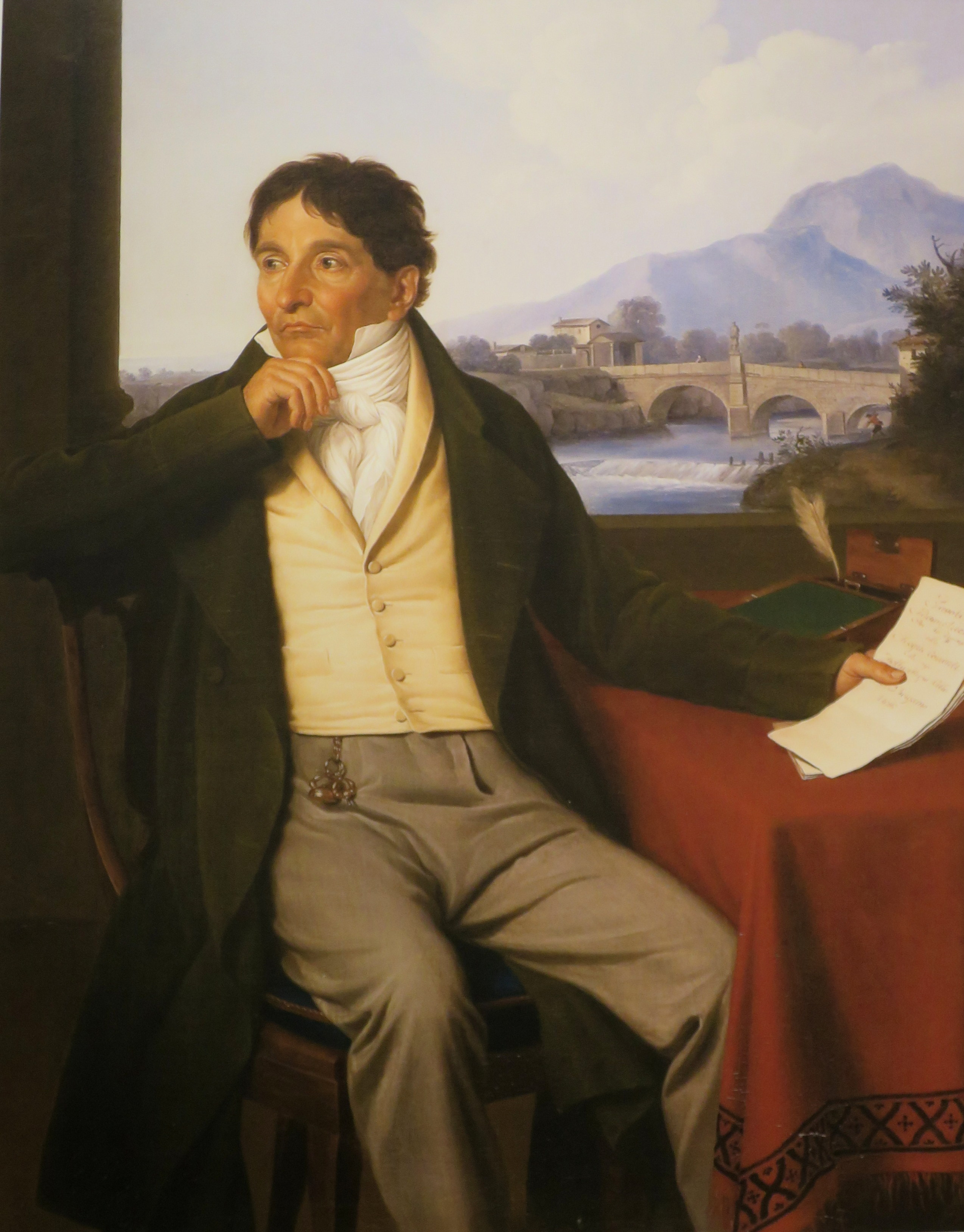 oloo su tela del maestro Giuseppe Diotti, 1826